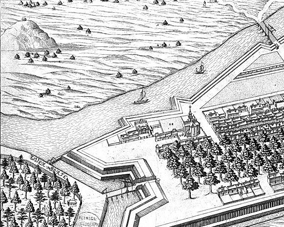 Ansicht des Hohen Weinbergs nordwestlich von Berlin.